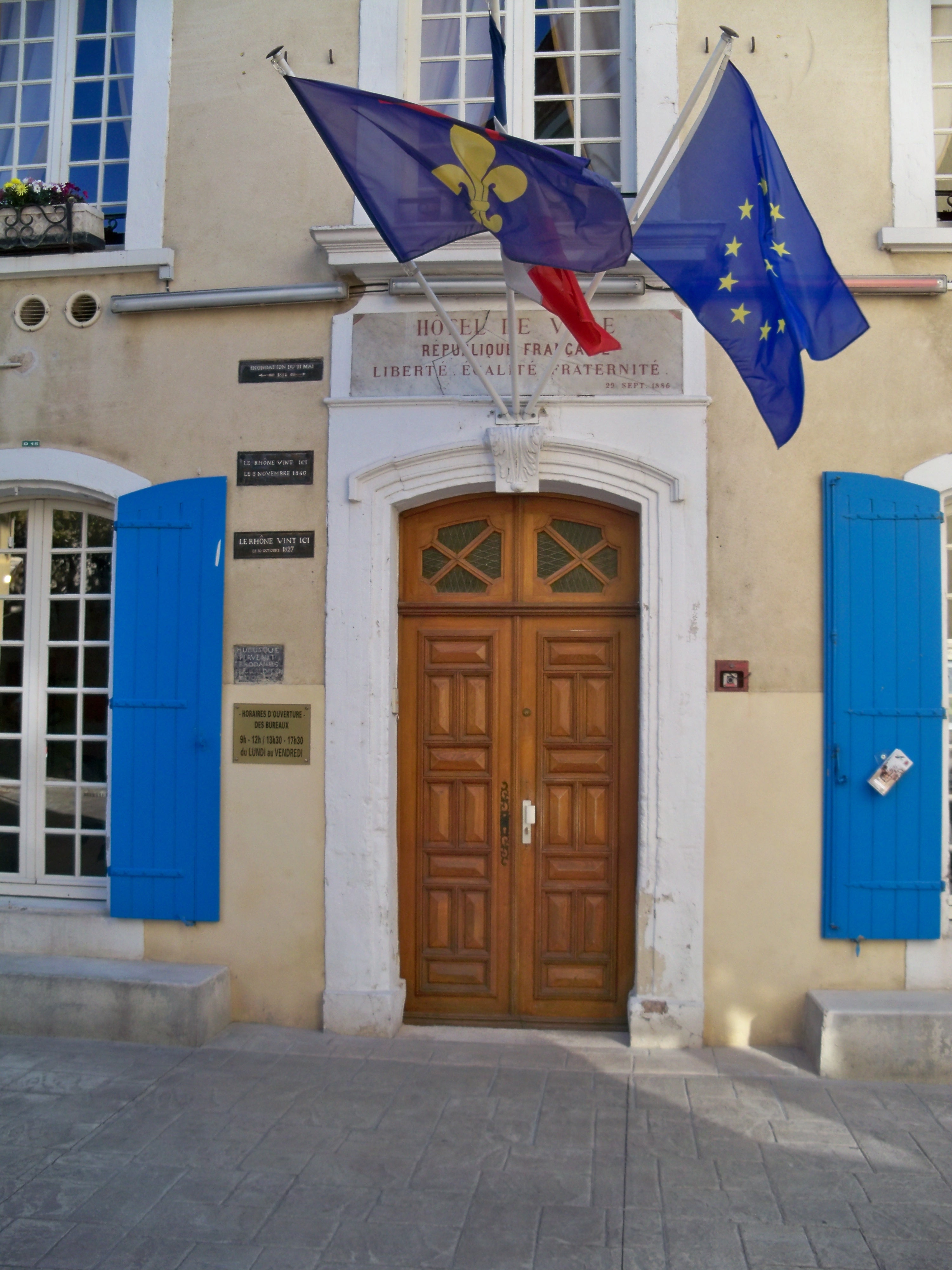 Porte de l'Hôtel de ville de Caderousse (Vaucluse, France). sur la Gauche de la porte, 3 niveaux d’inondations : 1827 (environ 2.10 m), 1840 (environ 3 m), 1856 (environ 4m)